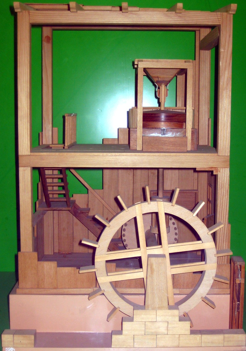 Roda de Vitruvi/Rueda de Vitruvio/Vitruvius' wheel; Museu de la Ciència i de la Técnica de Catalunya (Terrassa)